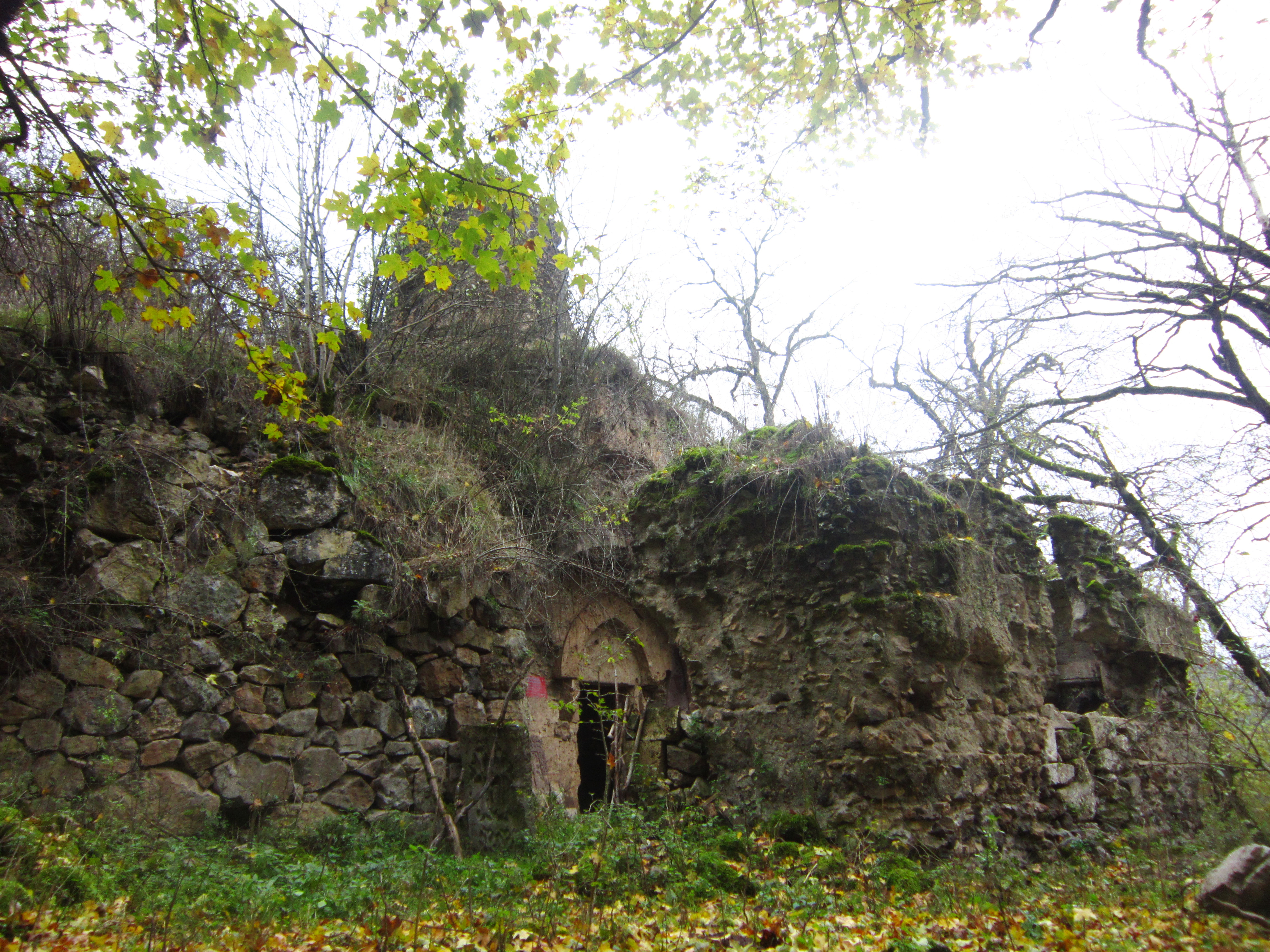 Վանական համալիր Շխմուրադ 38/16